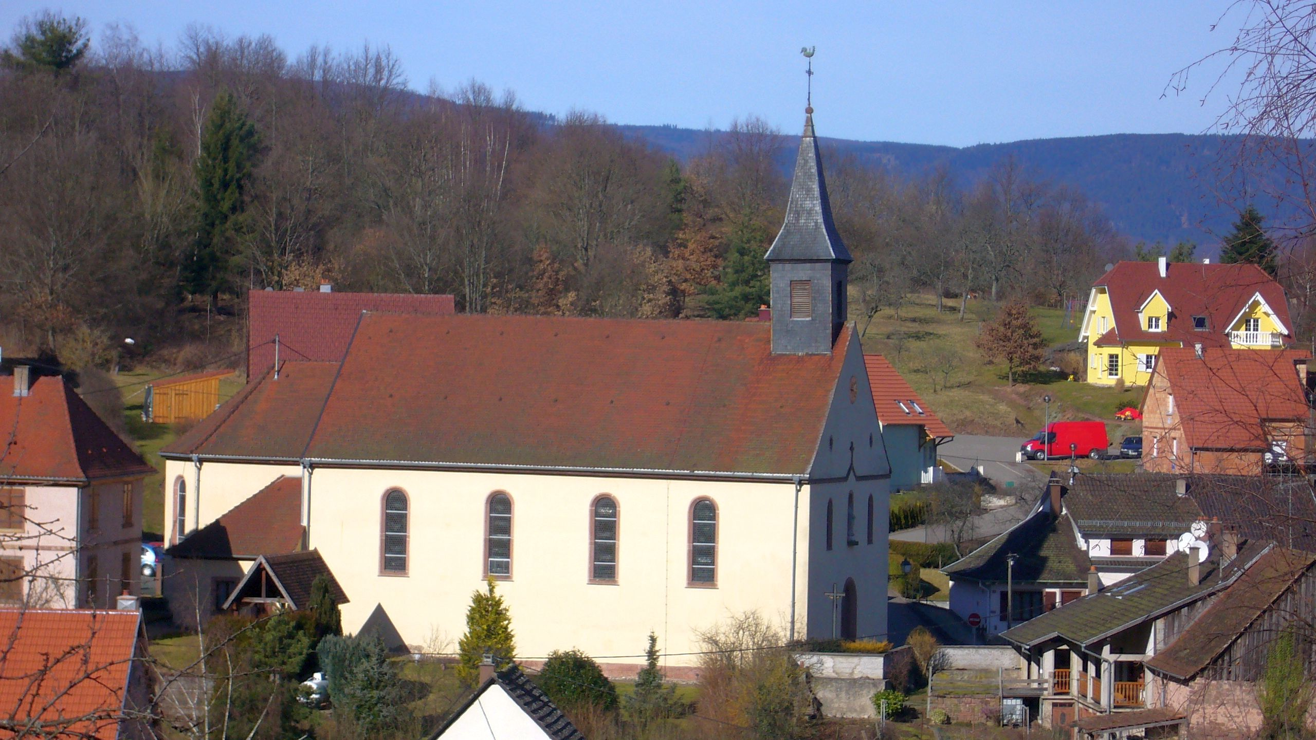 Neubois, Eglise Saint-Materne